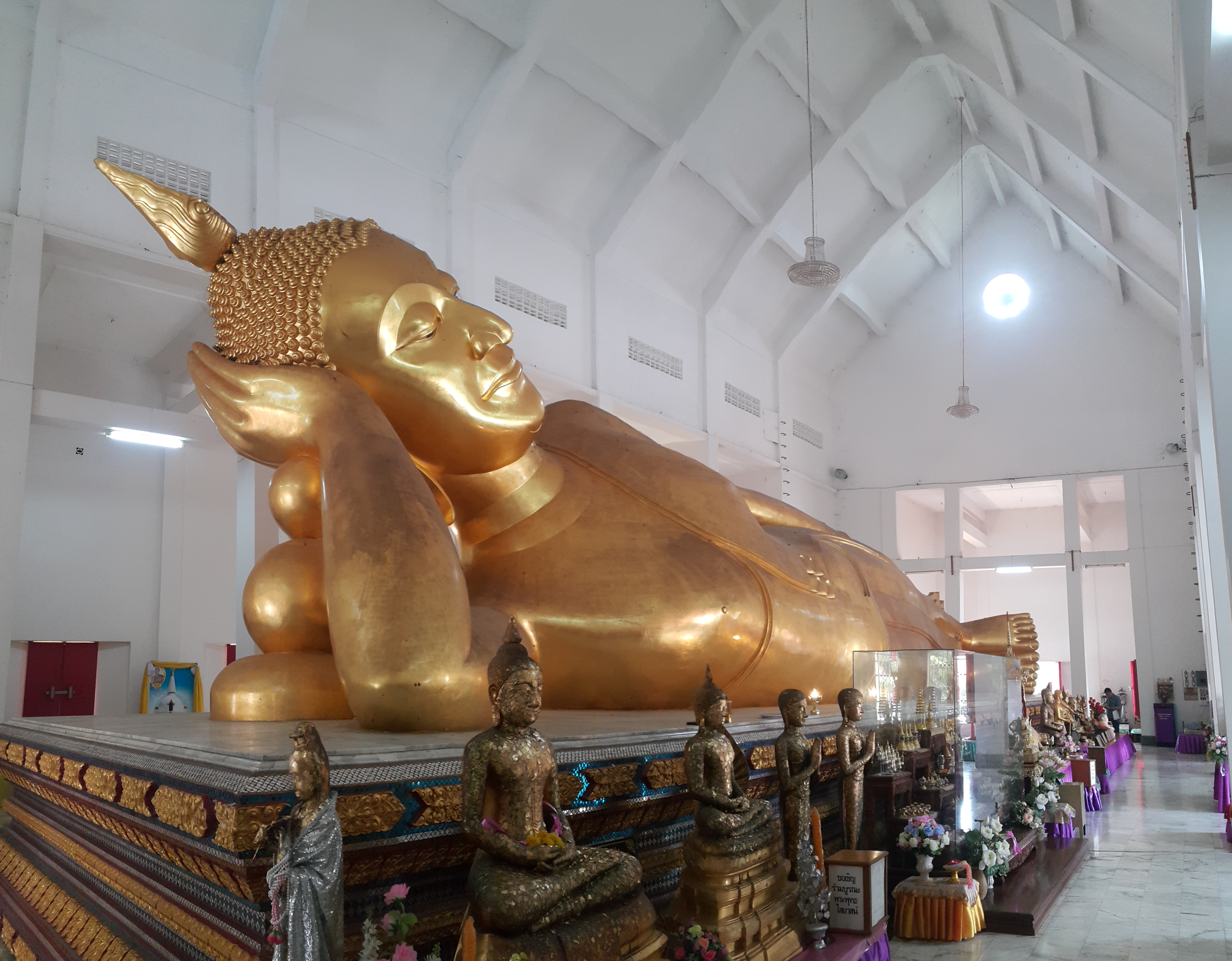 วัดไผ่ล้อม พระอารามหลวง